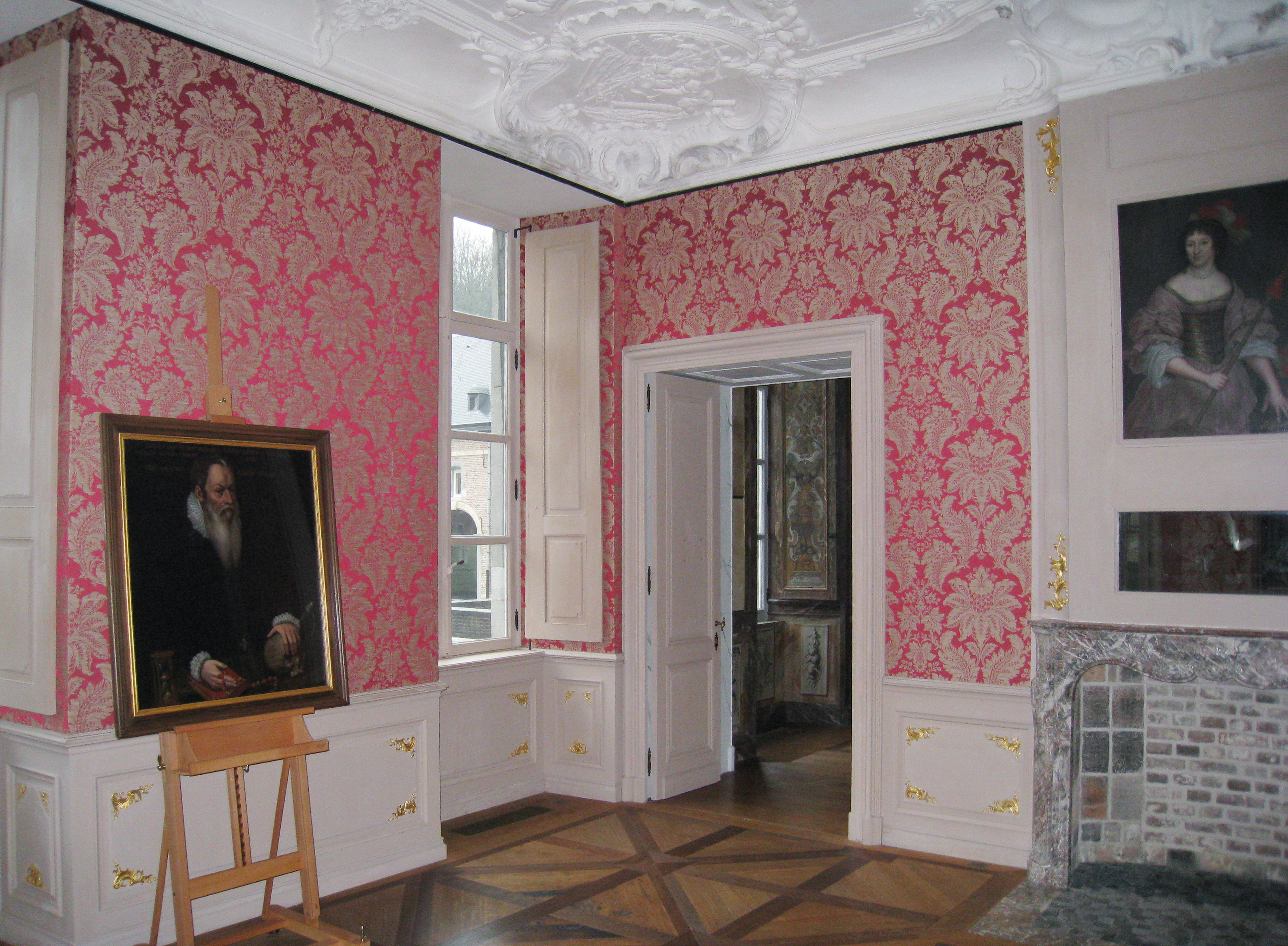 Salon im Schloss Alden Biesen, Rijkhoven, Belgien